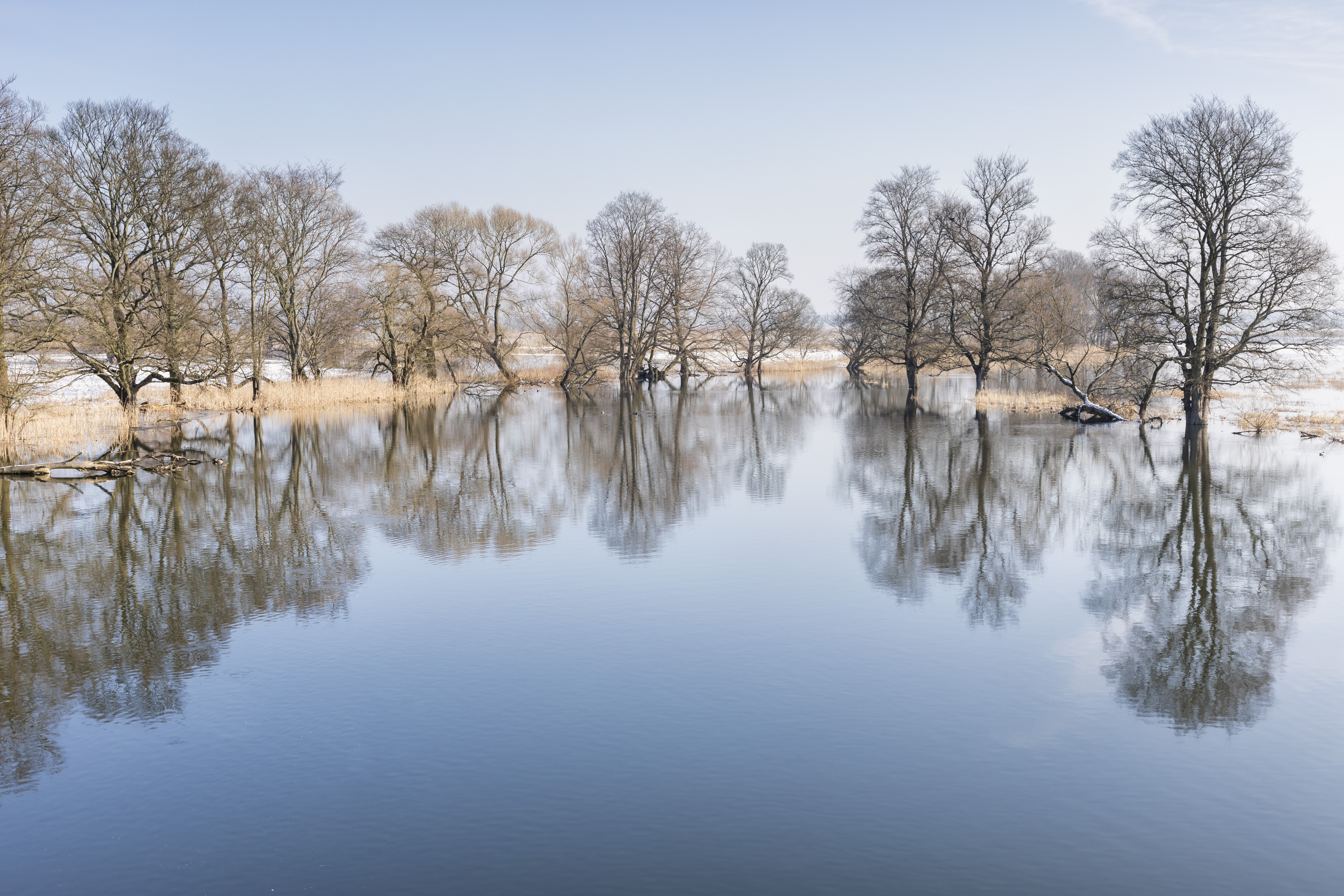 Im Winter sind diese Polder geflutet, der Fluss hat Platz sich auszubreiten. Im Sommer werden die Polder als Wiesen genutzt.